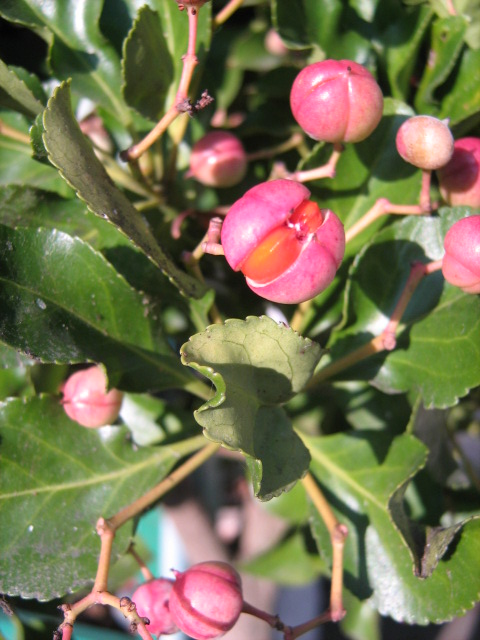 fruit en gros gros plan